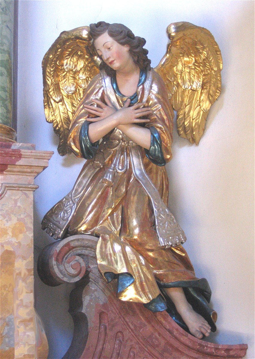 Klosterkirche St Anna in München, Engel am Kreuz-Altar von Egid Quirin Asam, 1734